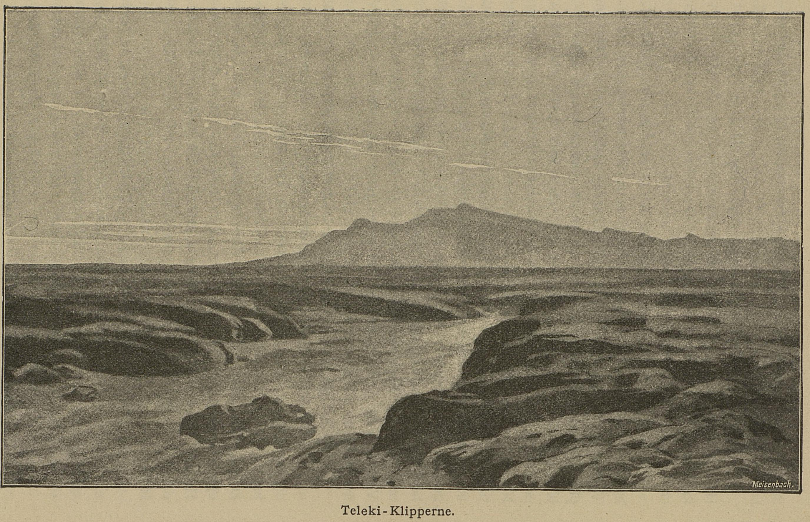 Illustrasjon hentet fra boken "Den tyske Emin Pascha-Expedition" av Peters, Carl og utgitt av Forlagsbureauet (Kjøbenhavn, 1891)